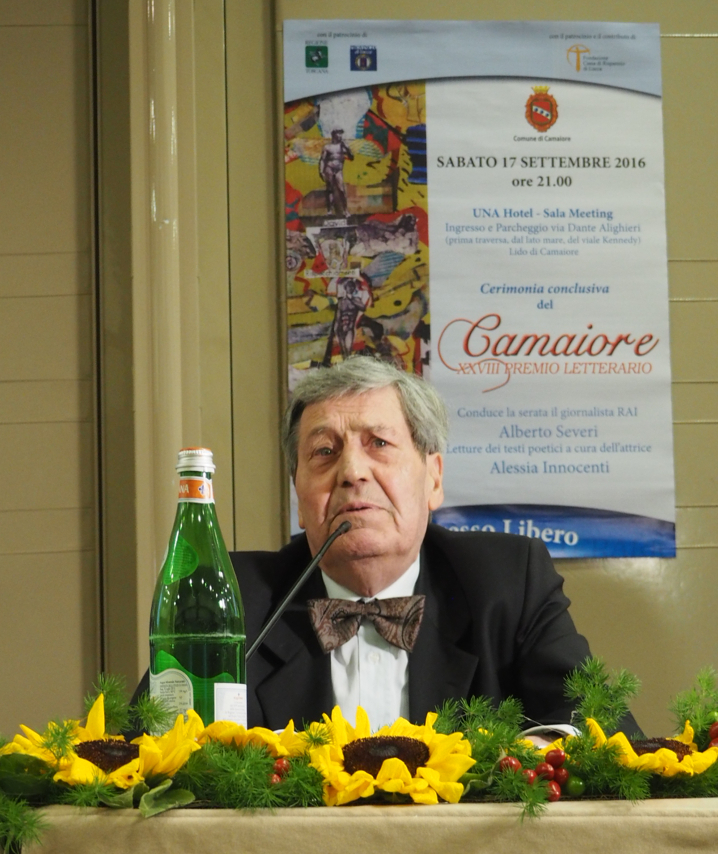 Francesco Belluomini al XVIII premio letterario Camaiore.